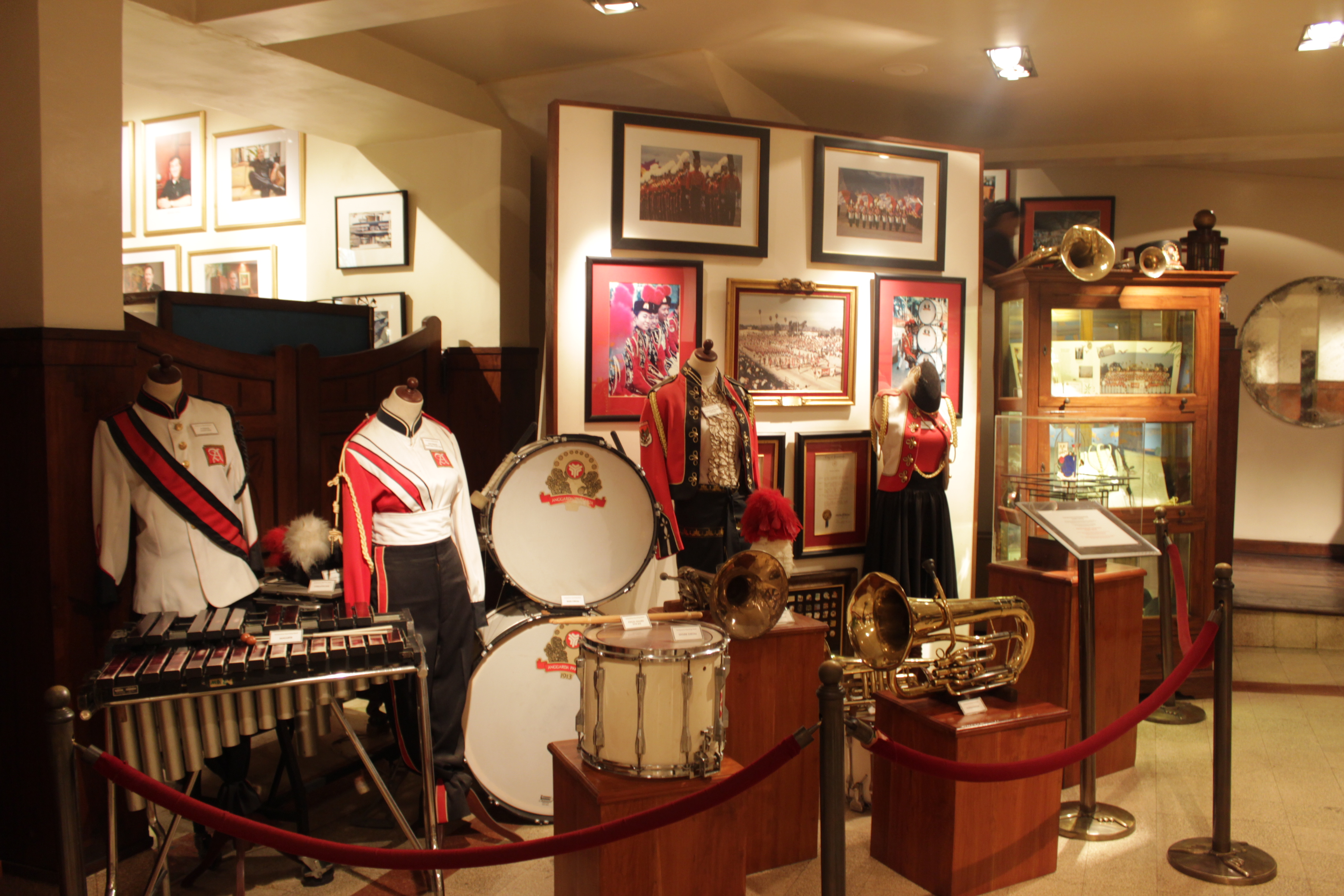 Basa Jawa: Salah sawijining koleksi